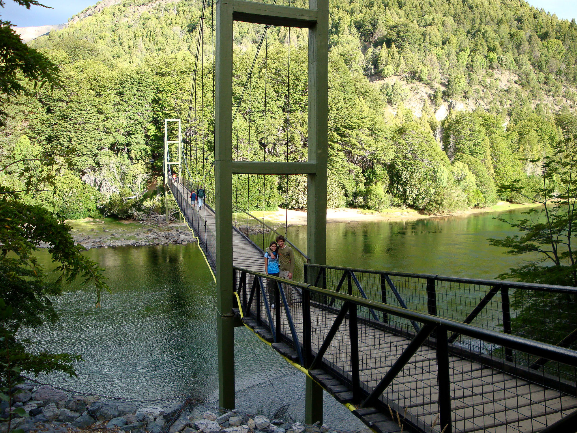 Pasarela lago verde